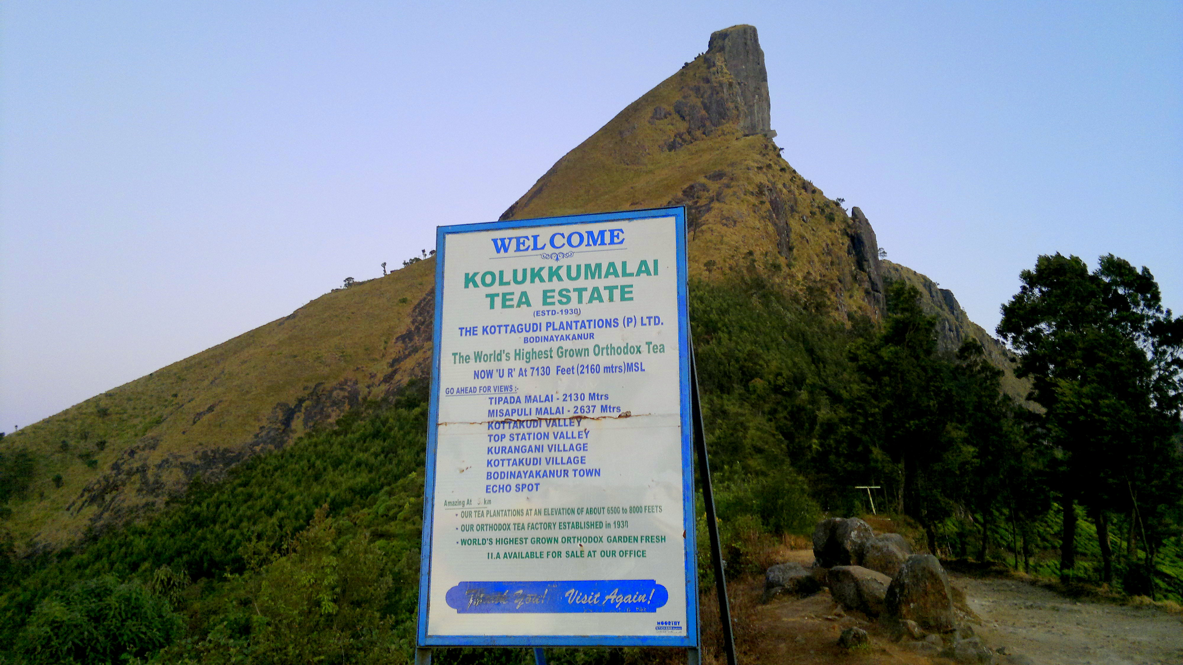 kollukumali